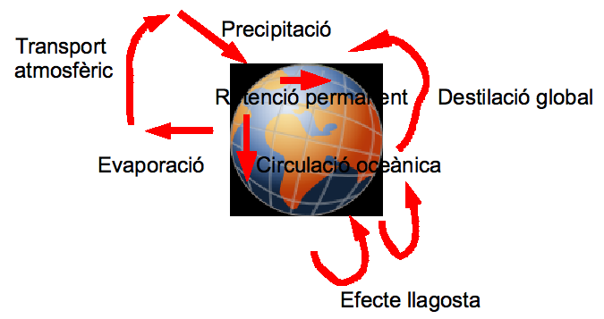 Transport de transport dels COP segons Wania i Mackay 1996